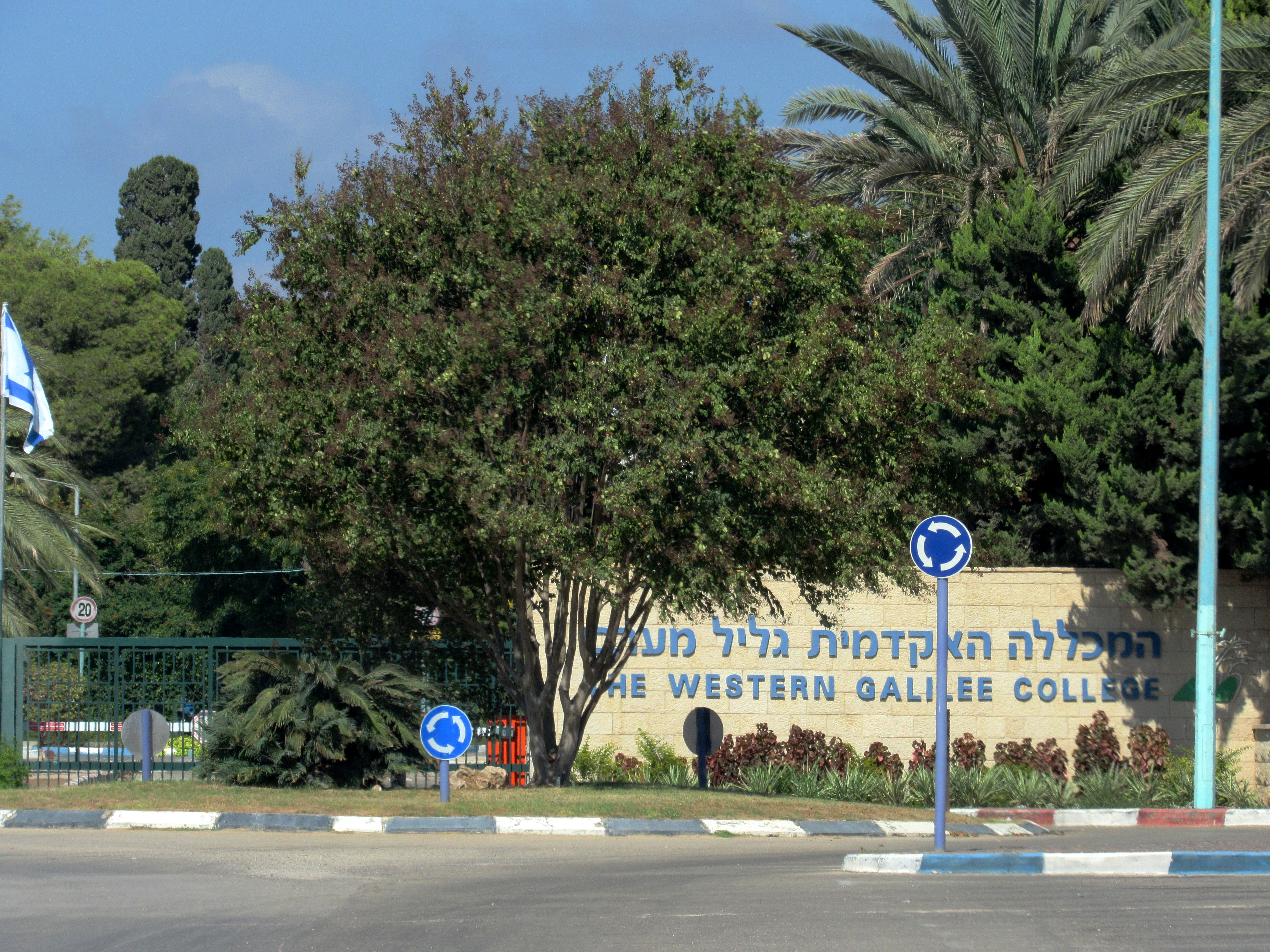 Acre